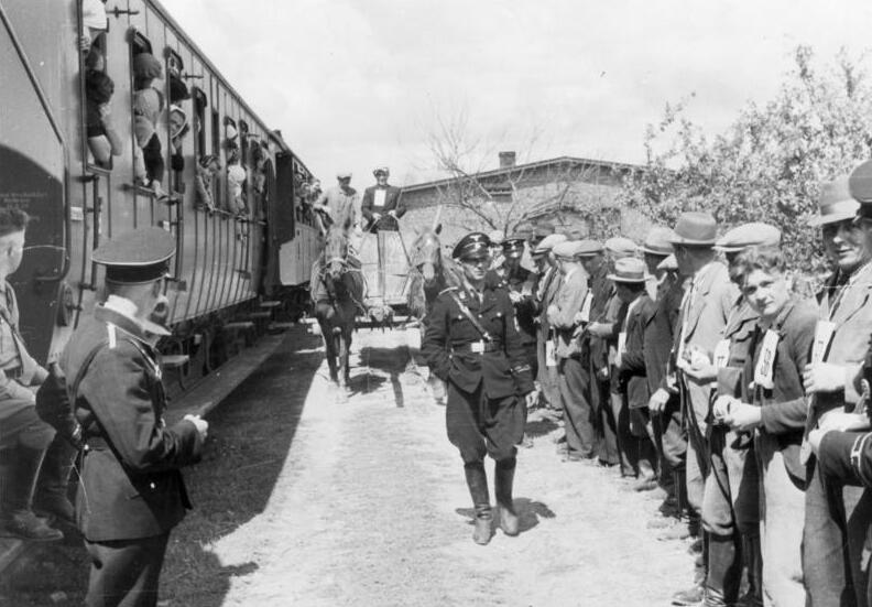 Ankunft galizischer Umsiedler in Schwarzenau bei Gnesen. Die Bauern treten in der Reihenfolge der Hofnummern an. 1940 Fotograf: W. Holtfreter